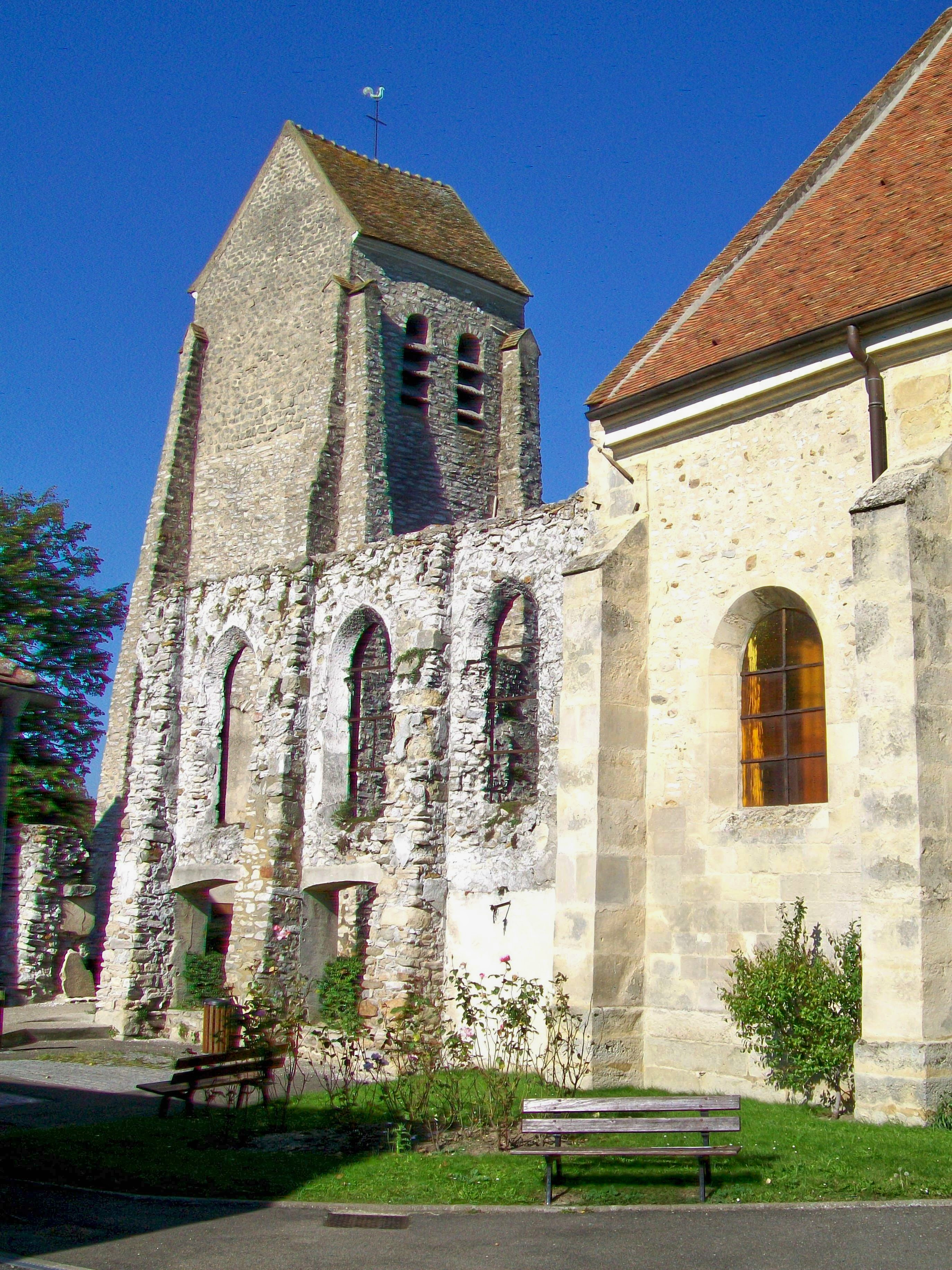 Trois des cinq travées de la néf sont ruinées. Les vestiges se sont en partie écroulés en 1993, si bien qu'il n'en reste que ce pan de mur.